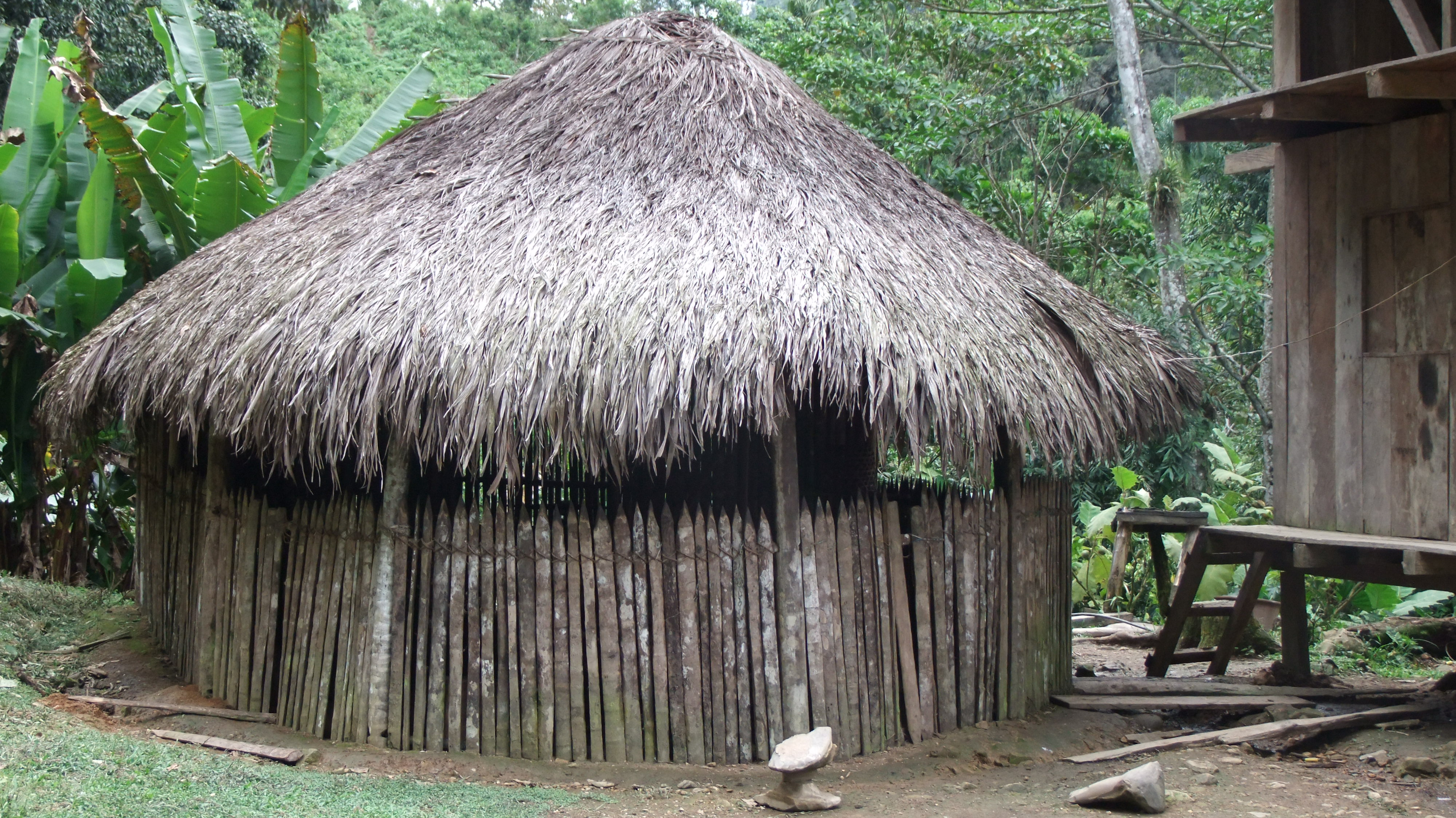 La Choza ubicado cerca de las Cascadas del valle misterioso, Huambi, Ecuador